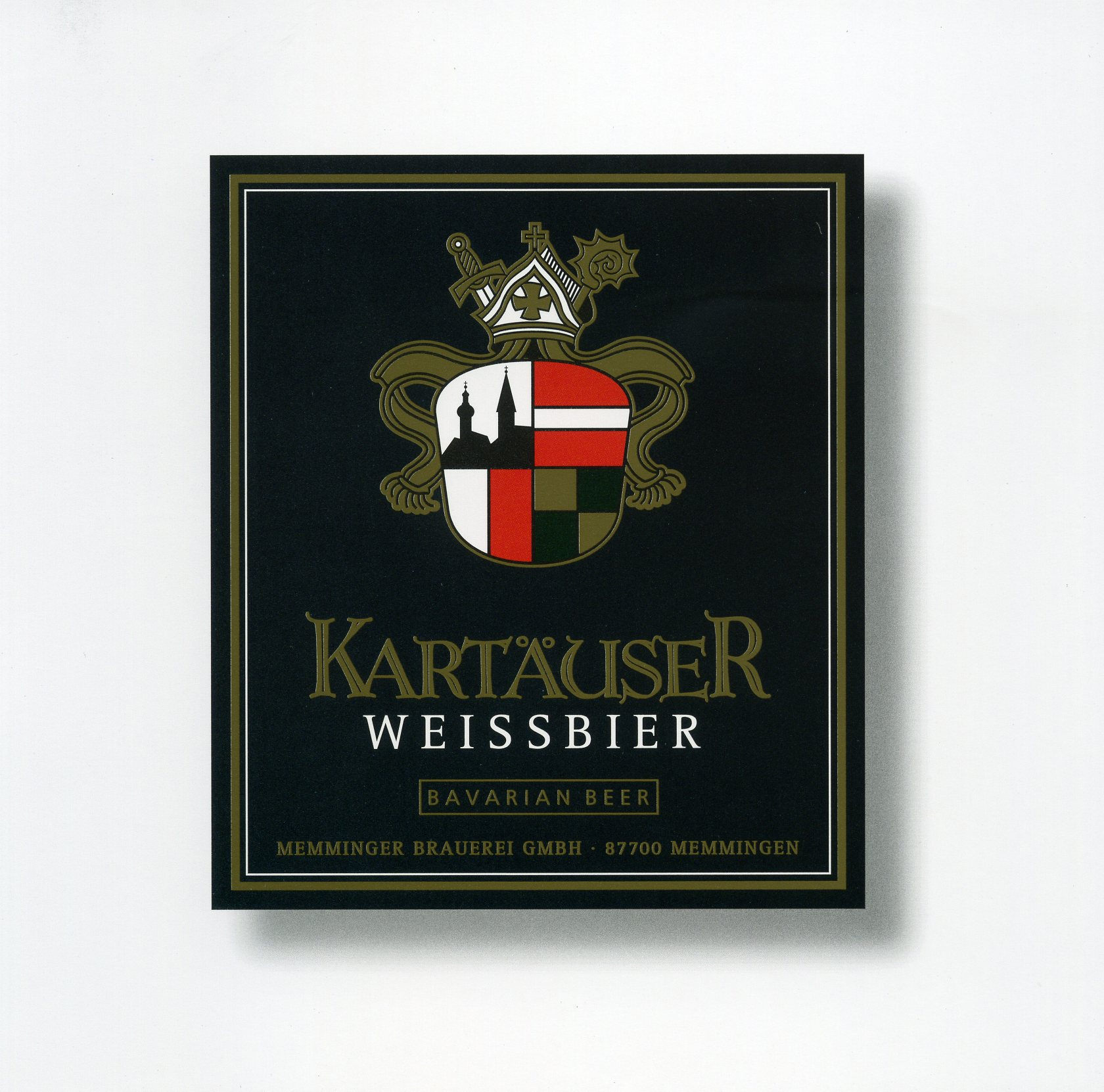 Etikett des Kartäuser Weissbier, einer Weizenbierspezalität der Memminger Brauerei, gebraut nach einem Kartäuserrezept der Reichskartause Buxheim